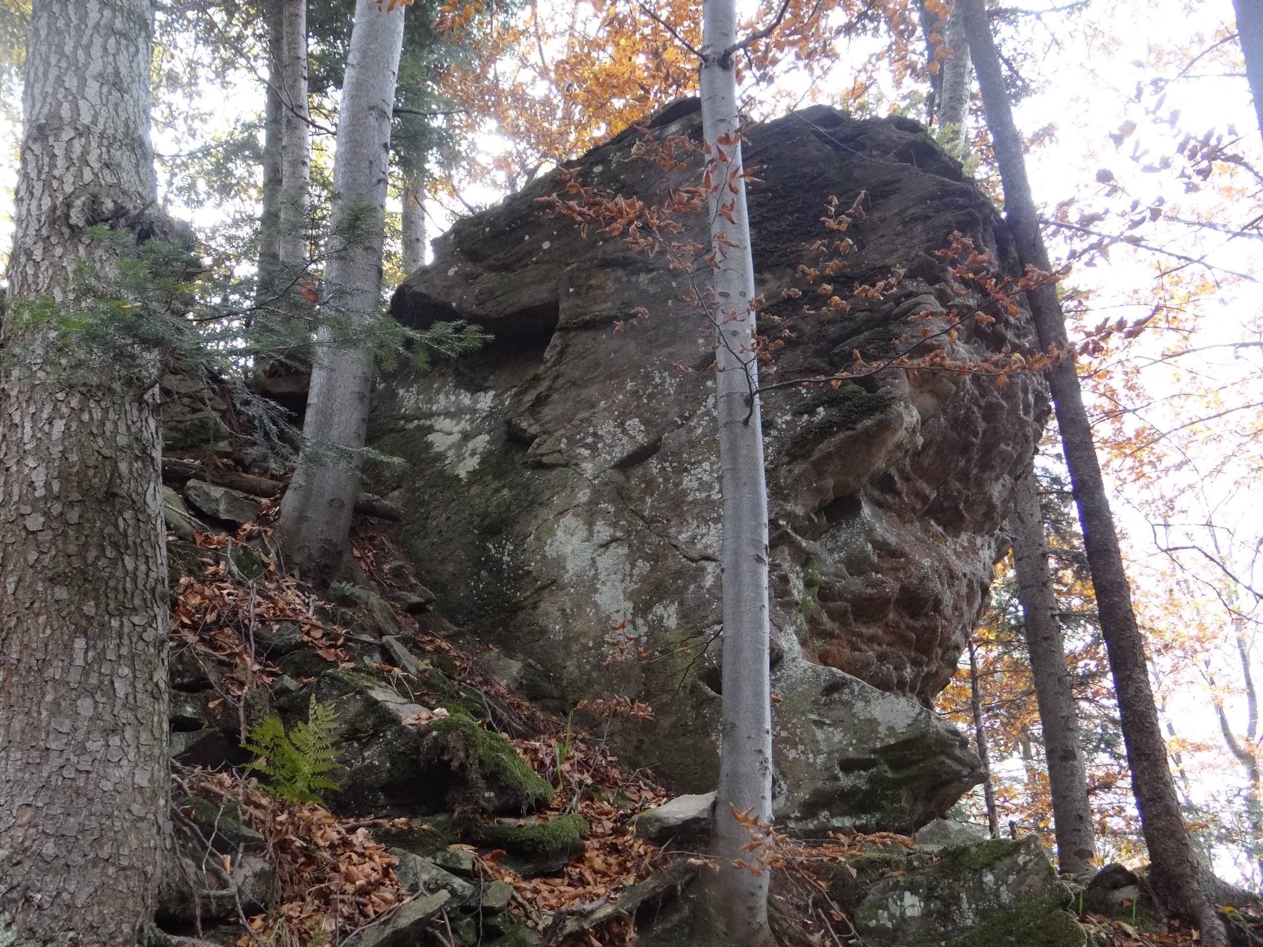 Czubaty Groń